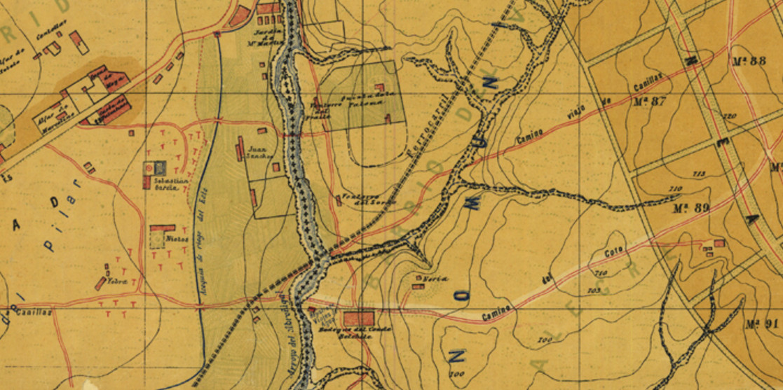 Detalle de la hoja 2 del Plano de Madrid en 1900, dibujado por Facundo Cañada. Se aprecia el dibujo rotulado del Registro del Viaje de Aguas en el camino de Canillas. Descripción cartográfica del plato total: Plano de Madrid y Pueblos colindantes de Aravaca, Canillas, Canillejas, Carabanchel Alto, Carabanchel Bajo, Chamartín, El Pardo (Real Sitio), Fuencarral, Getafe, Hortaleza, Leganés, Pozuelo de Alarcón, con sus barrios de Húmera y Estación; Vallecas, Vicálvaro, Villaverde, etc, al principiar el siglo XX. El plano va acompañado de una Guía, con el Directorio de Madrid y otras notas aclaratorias.